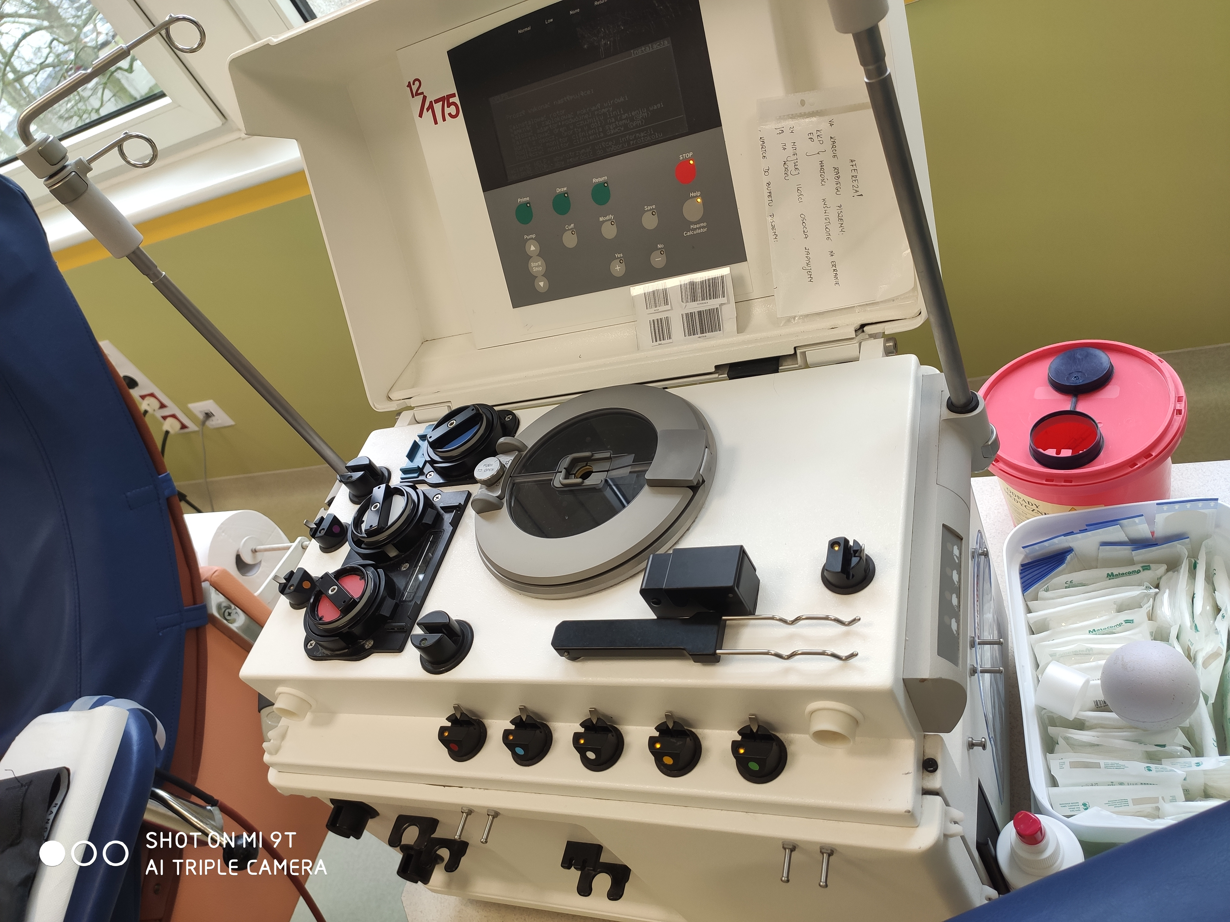 Separator komórkowy do aferezy płytek krwi.